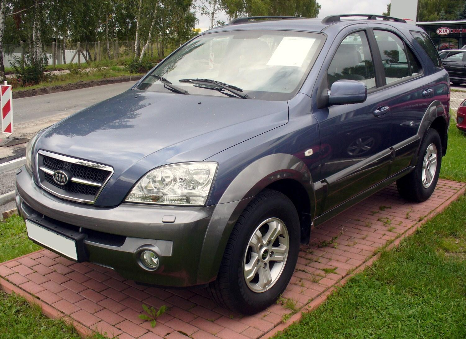 Kia Sorento